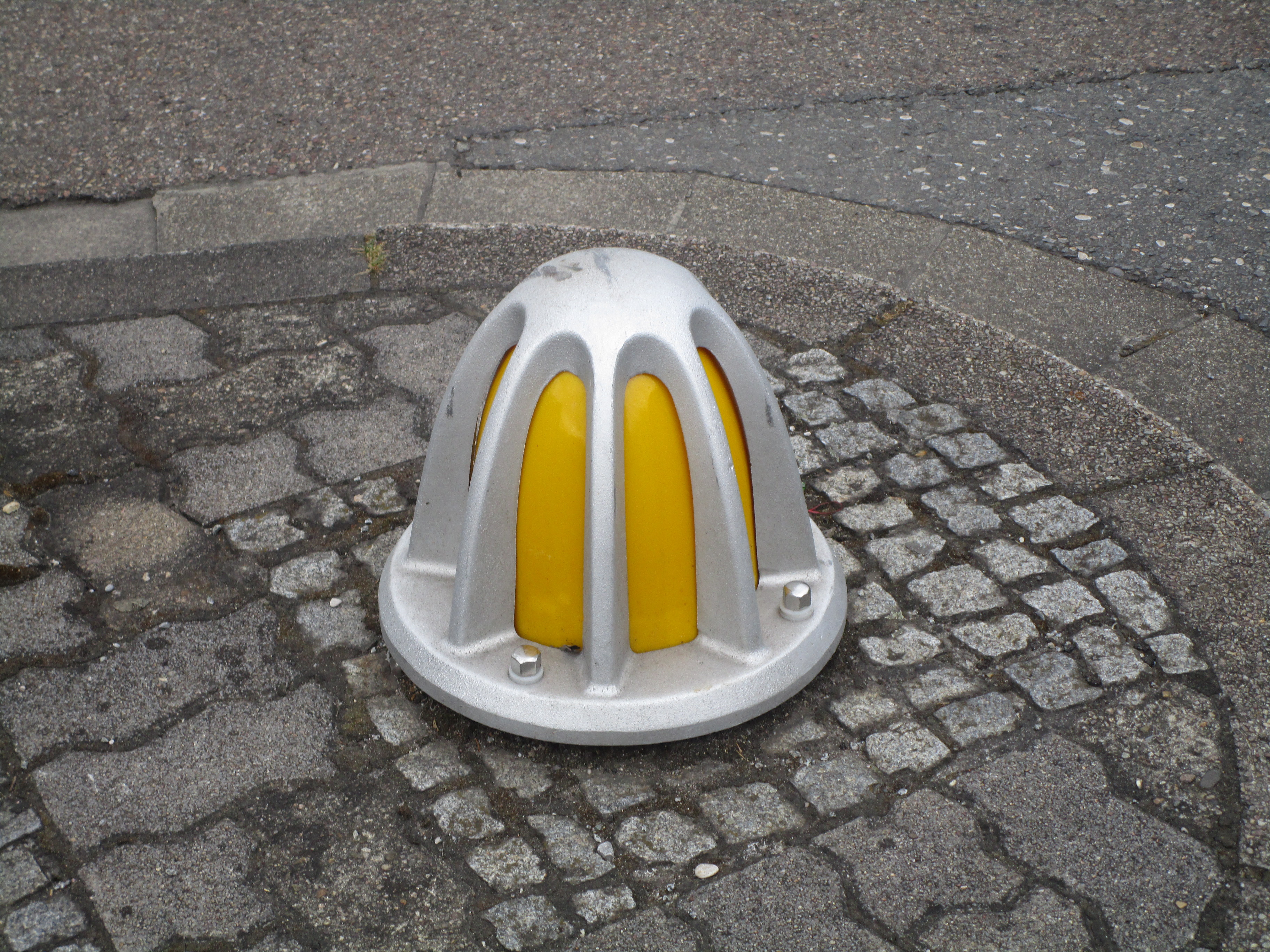 Eine restaurierte Verkehrsschildkröte (Verkehrsinselleuchte) von der ehmaligen Schilderfabrik Merkel aus Schwetzingen an einer Kreuzung in Heidelberg